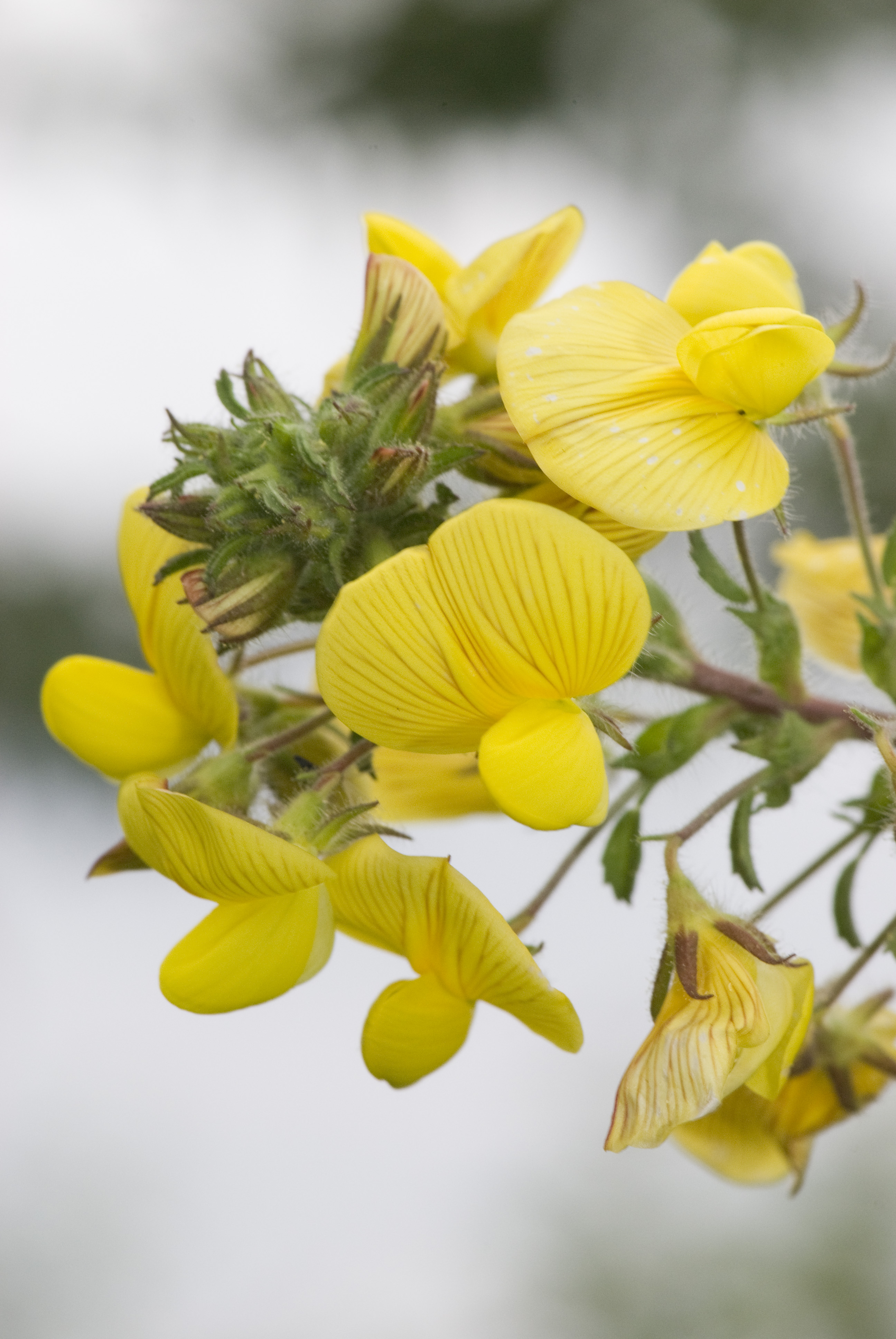 Ononis natrix Lemmes (Meuse), France